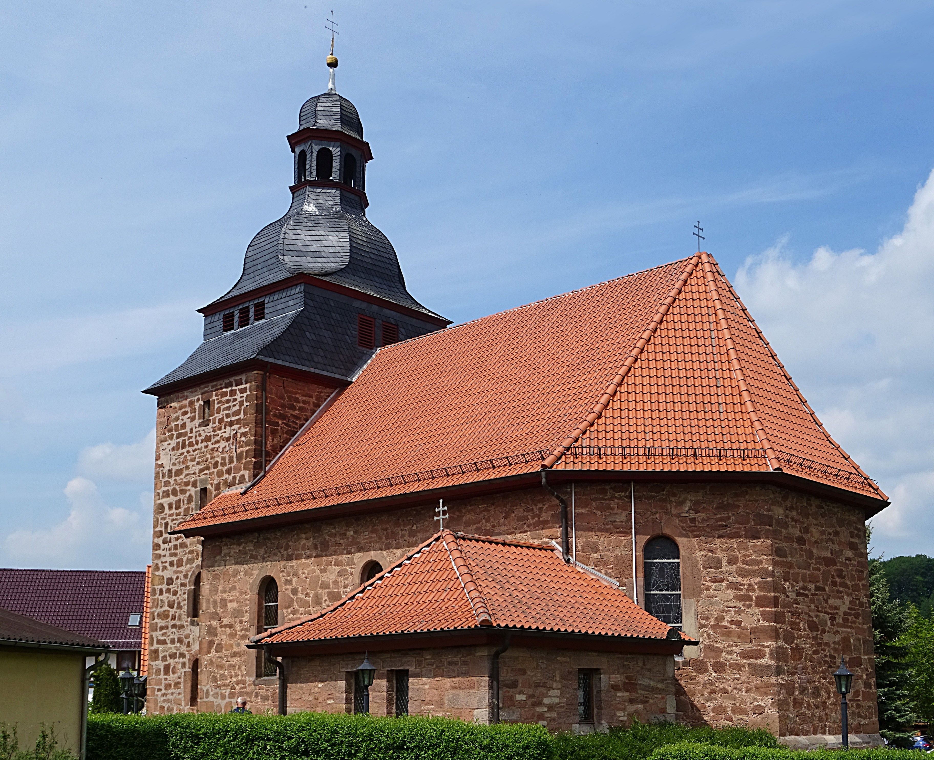 Dorfkirche St. Nikolaus (Neuendorf) von Osten